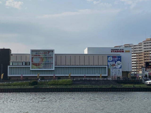 アルゴ7の外観